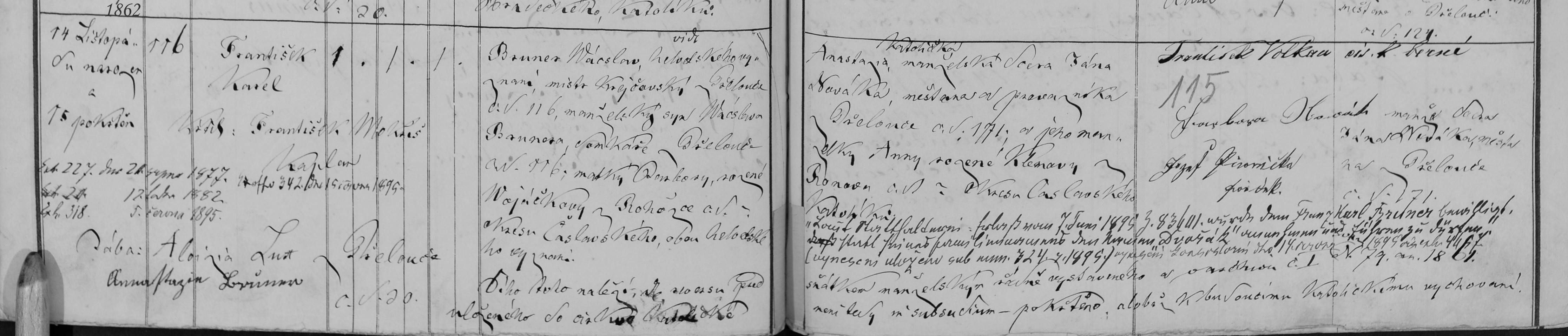 matriční zápis o narození a křtu Františka Brunnera (matrika N 1857-1869 Přelouč (SOA Zámrsk))